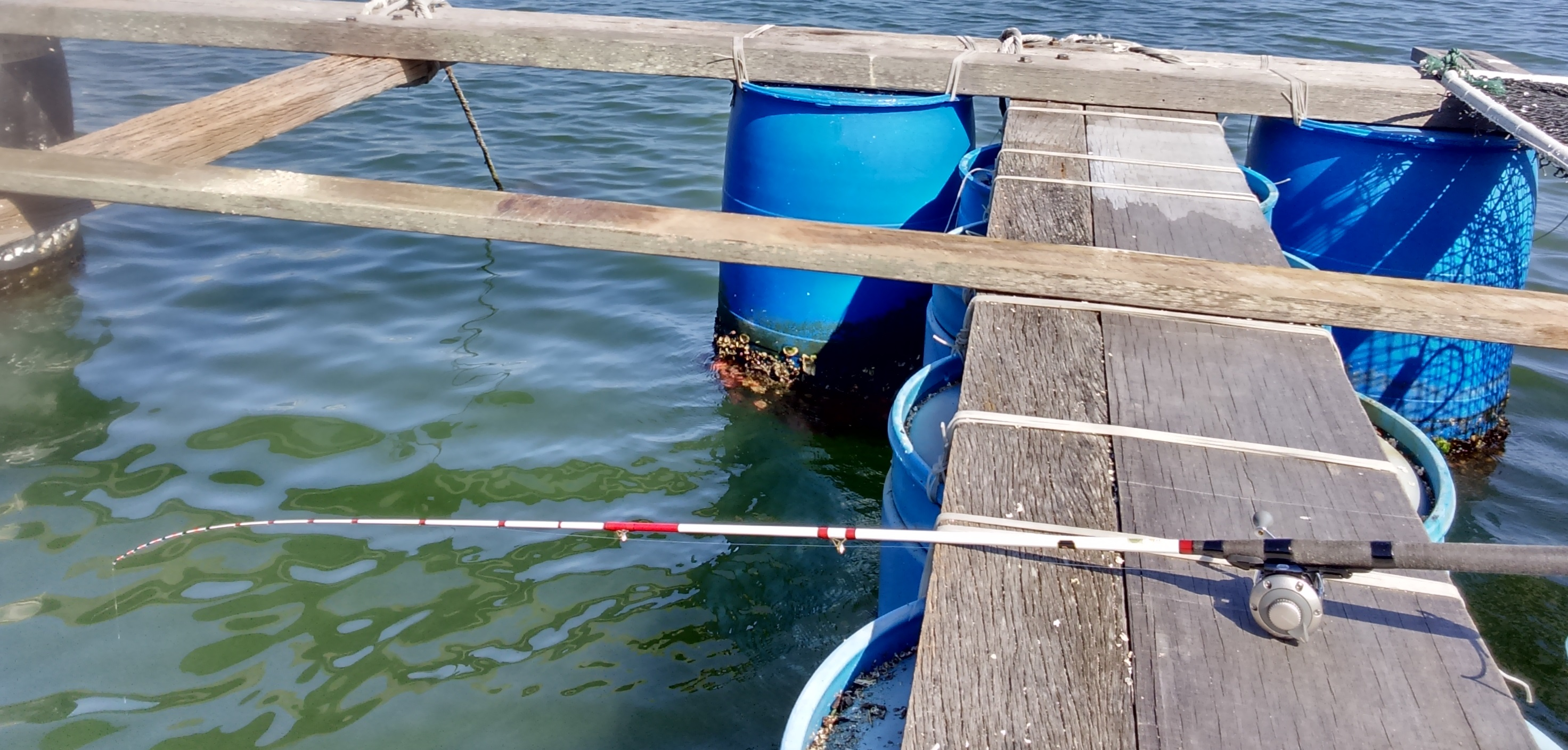 排釣的狀況